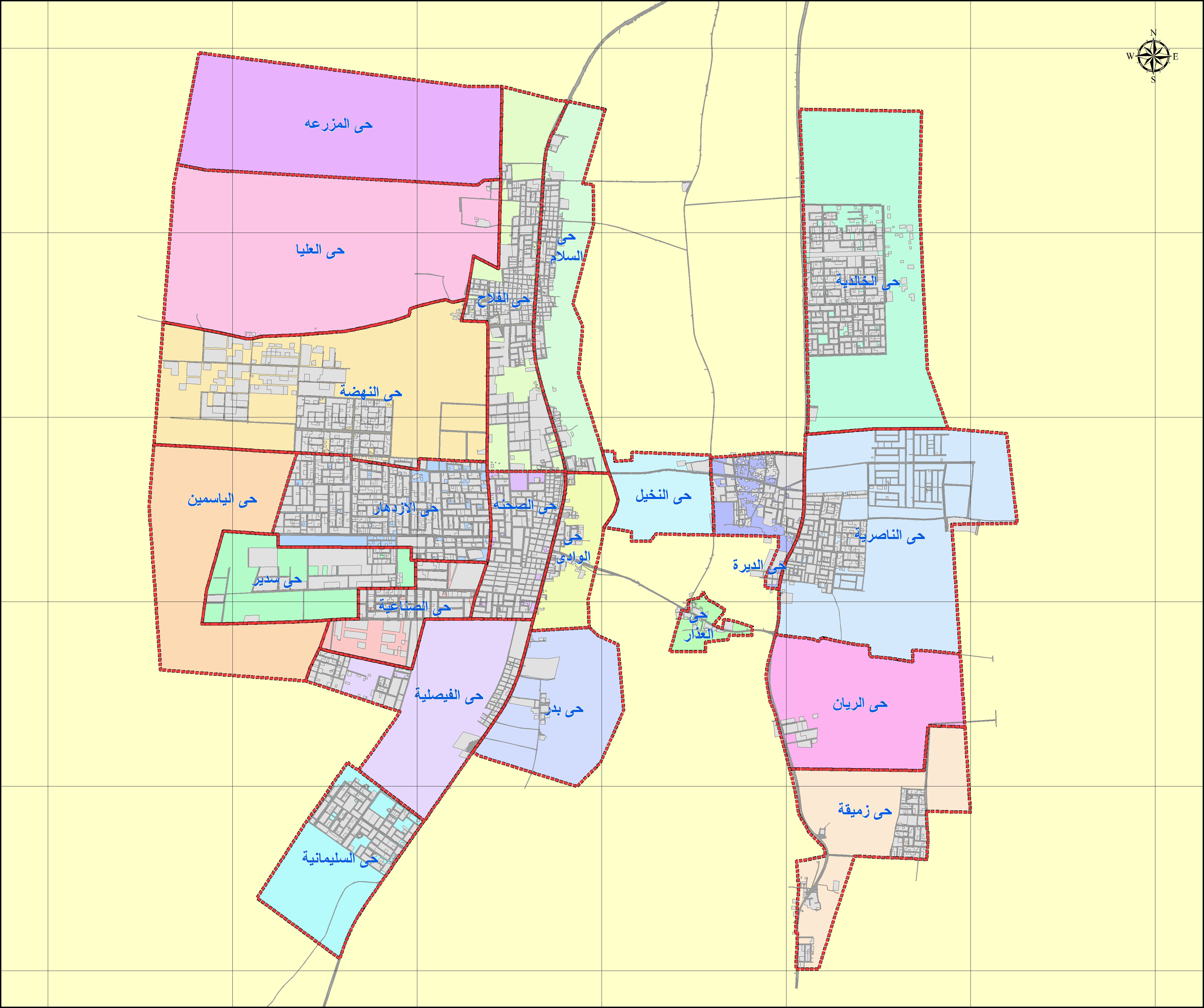 خريطة توضح نطاق بلدية الدلم يعود تاريخها إلى شهر أبريل، 2015